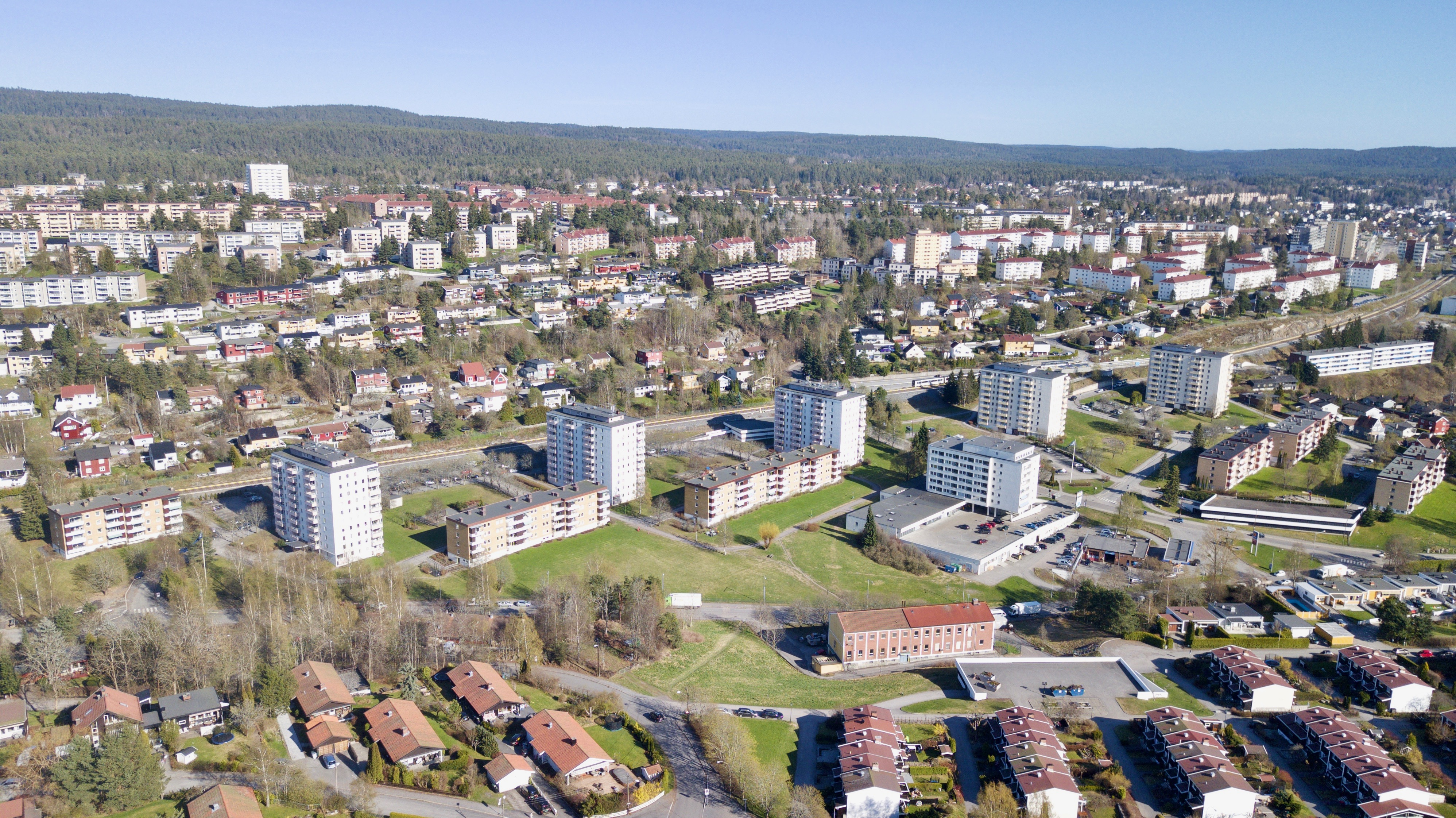 Skøyenåsen i Oslo.